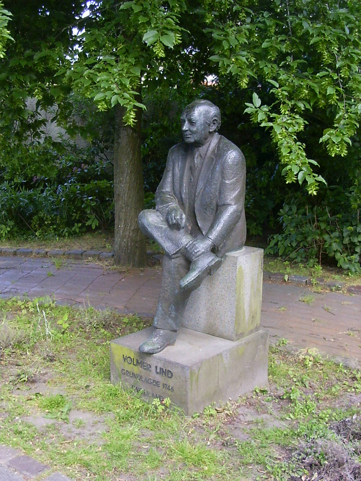 Aalborg, park Karolinelund, standbeeld van mede-oprichter Volmer Lind